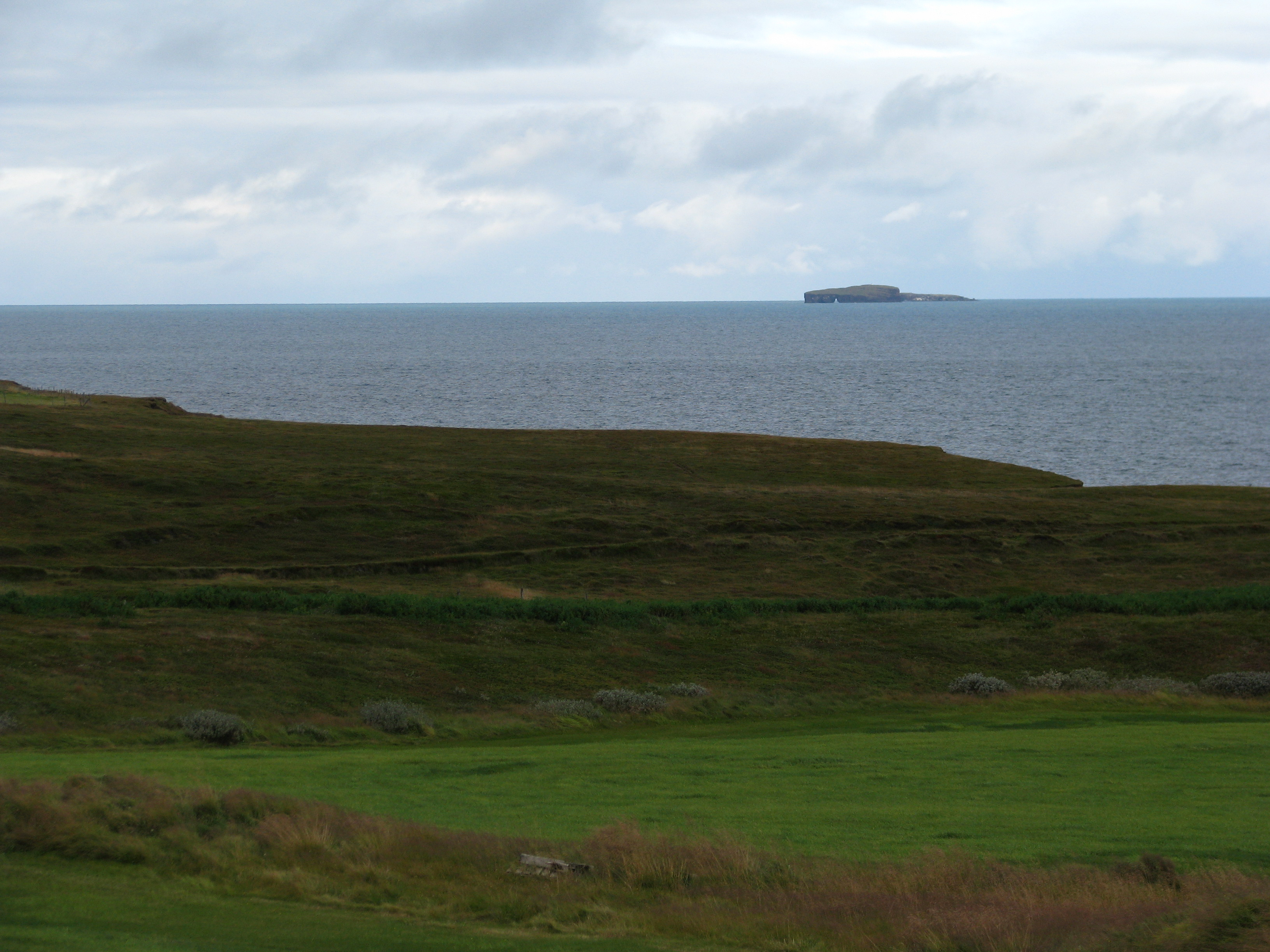 Mánáeyjar, island, Tjörnes, Iceland